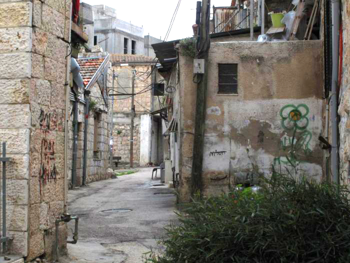 רחוב בנחלאות